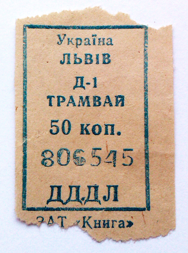 Трамвайний квиток, Львів, Україна. Tram ticket in Lviv, Ukraine. Jume 2010